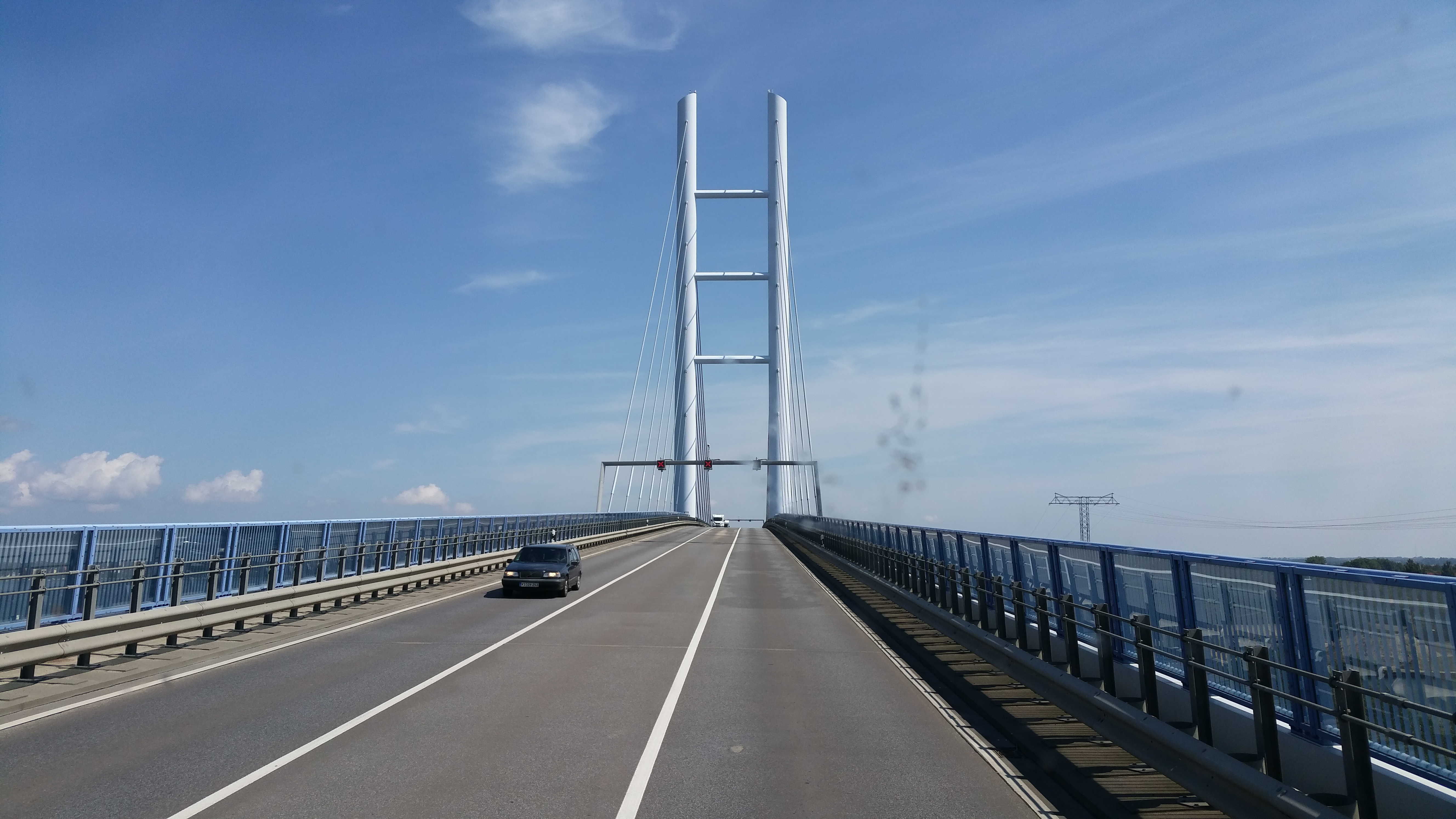 Rügendamm